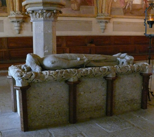 Klášter Heiligenkreuz - hrob Fridricha II. Babenberského